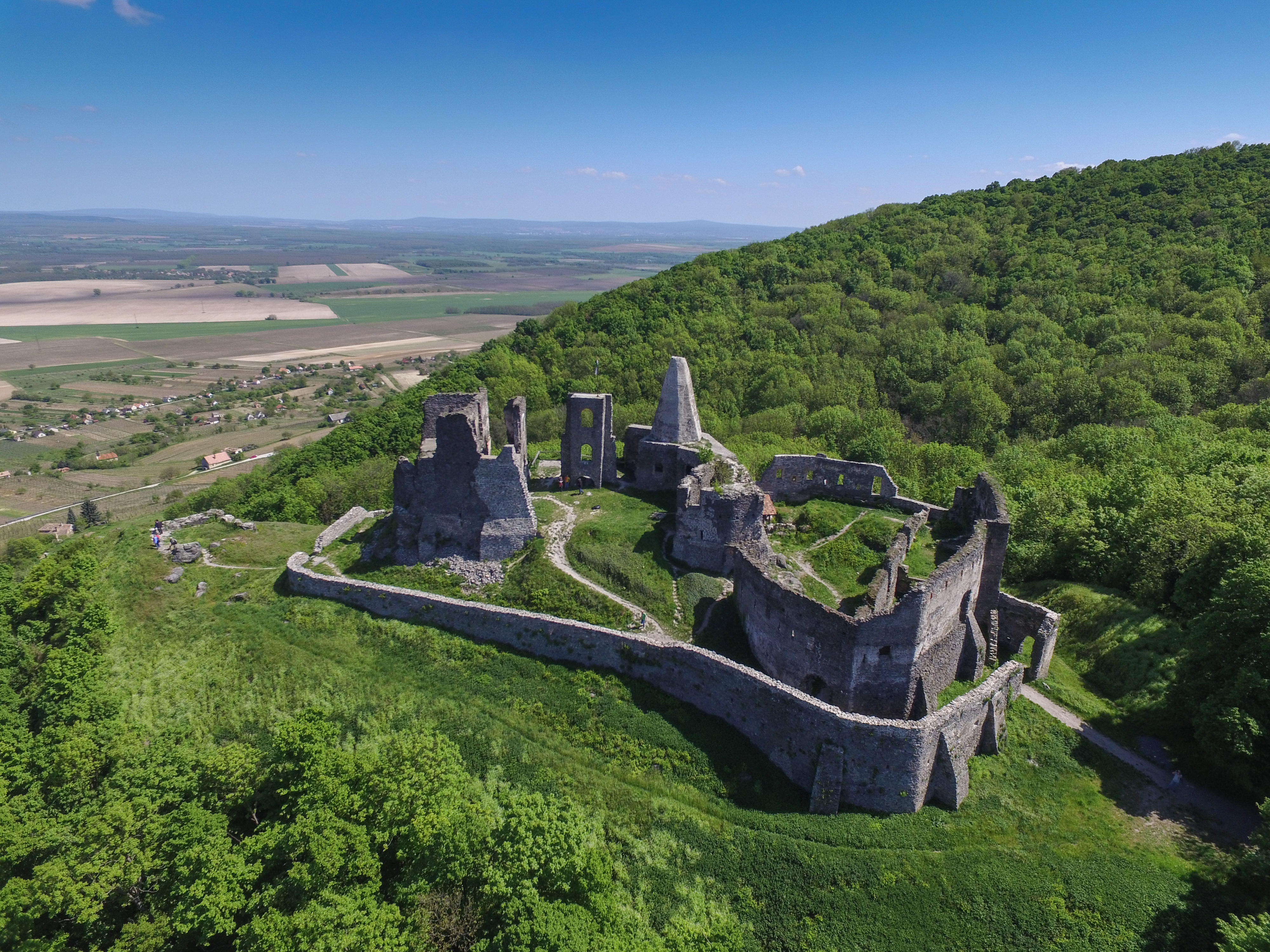 Eine Flugaufnahme von den Resten der Burg Somló